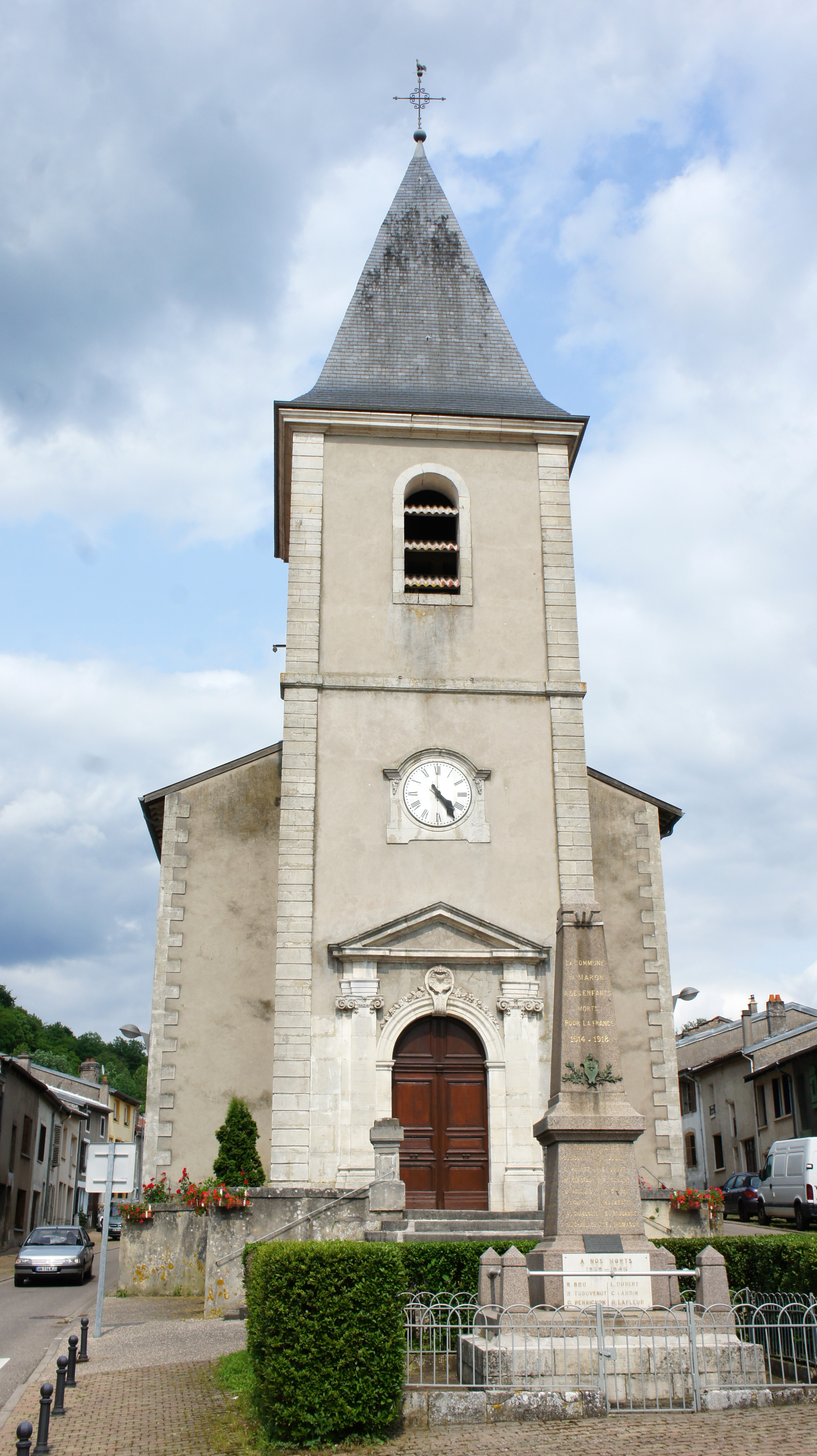 vue de l'Église monument aux morts.